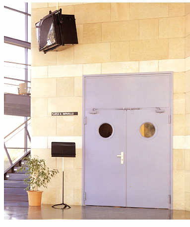 Puerta EI-RF-60 en Valencia. Autor: IgniNorma.